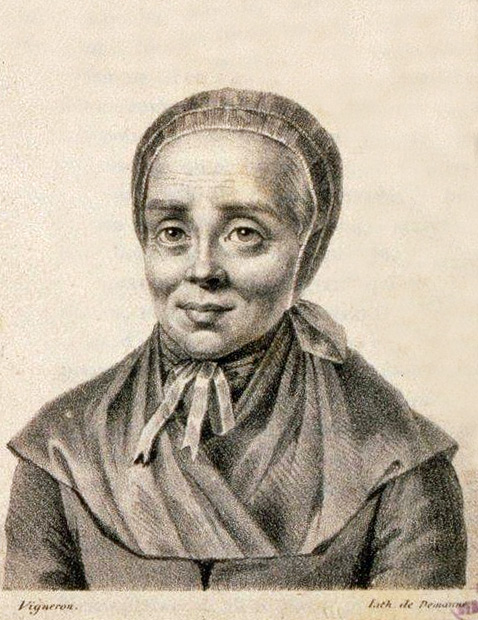 Louise gouvernante des pasteurs Oberlin. 1824. Bibliothèque nationale et universitaire de Strasbourg